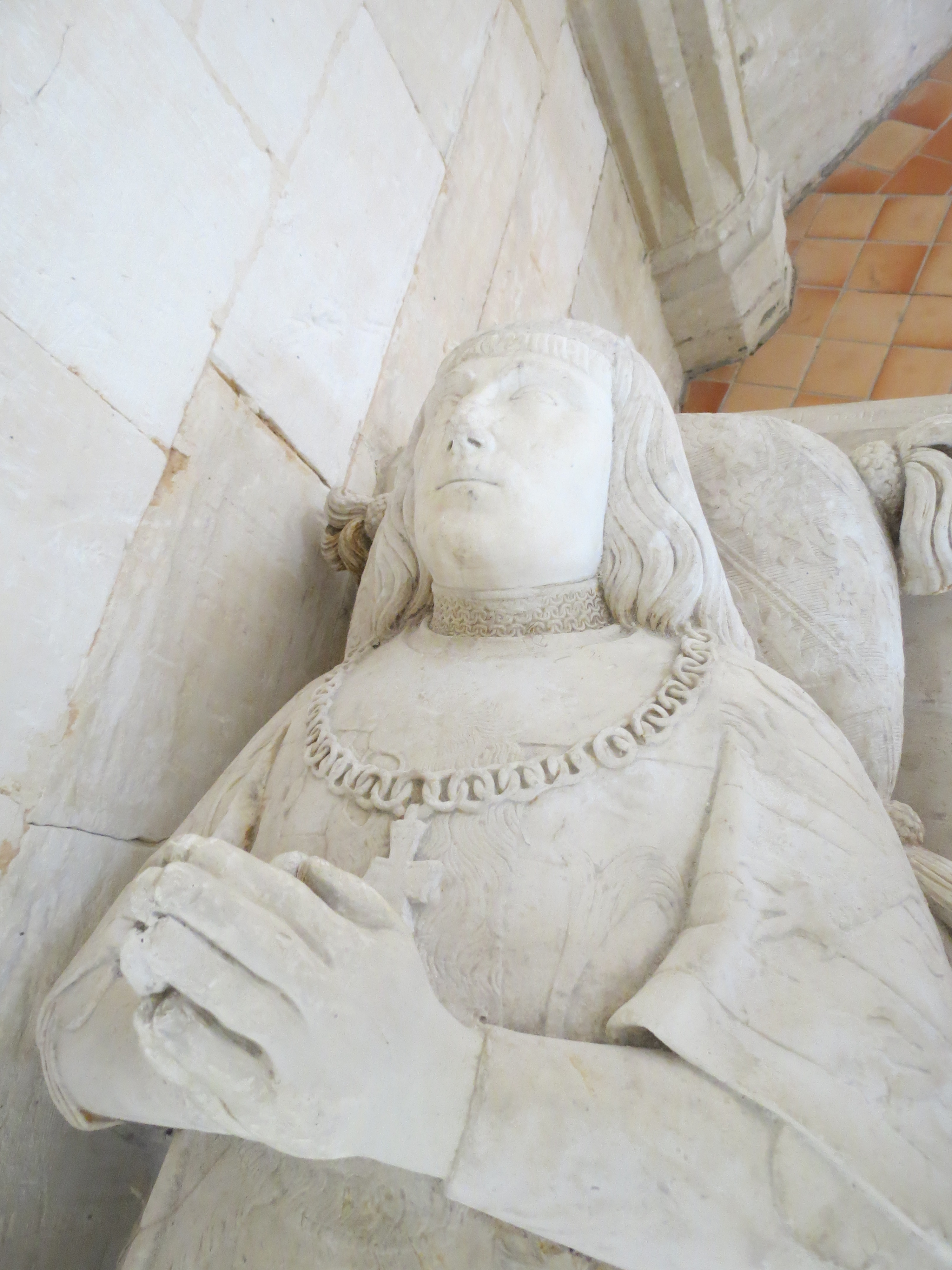 Détail du gisant de Nicolas d'Estouteville.